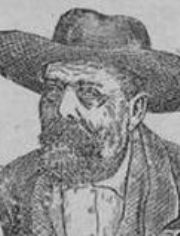 Doleschall Gábor (1813 – 1891) magyar orvos, botanikus.